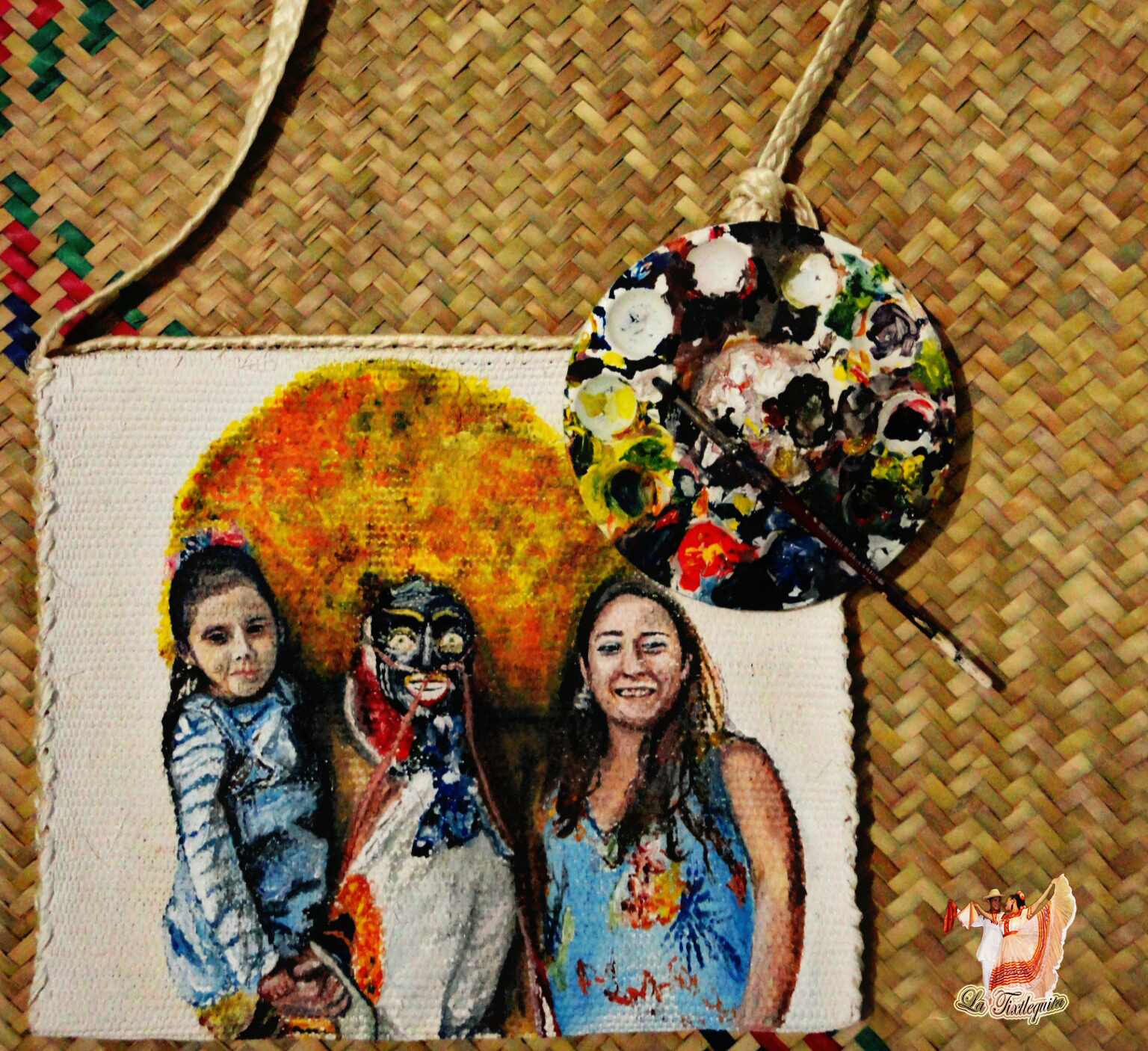 Artículo artesanal elaborado con fibras de Ixtle.